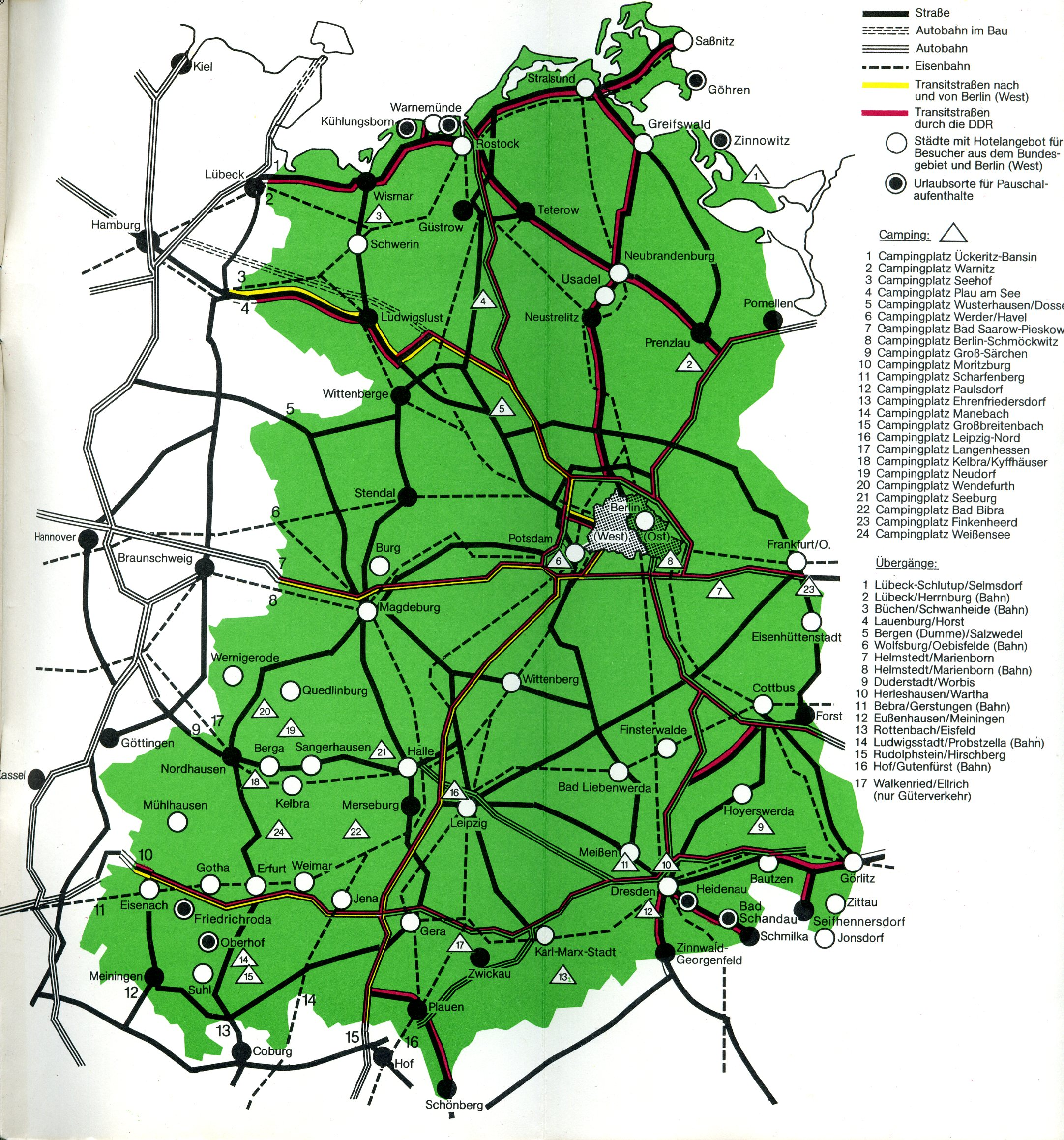 Karte der Übergänge an der innerdeutschen Grenze, mit Transitstrecken durch die DDR und nach und von Berlin (West) (Stand 1982). Aus dem amtlichen Merkblatt "Reisen in die DDR".